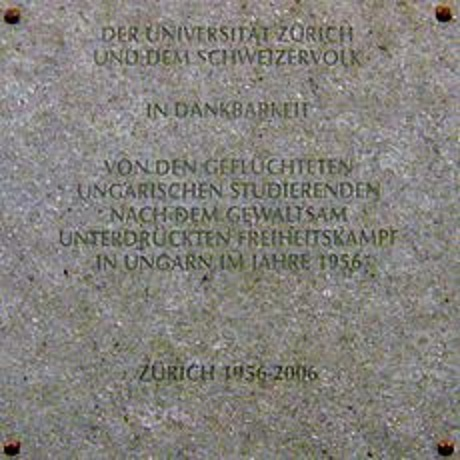 Gedenktafel der ungarischen Studierenden der Universität Zürich, die nach der gewaltsamen Niederschlagung des Freiheitskampfes von 1956 aus Ungarn in die Schweiz geflüchtet hatten. Die Gedenktafel wurde 2006 anlässlich des 50. Jahrestages der ungarischen Revolution von 1956 eingeweiht.